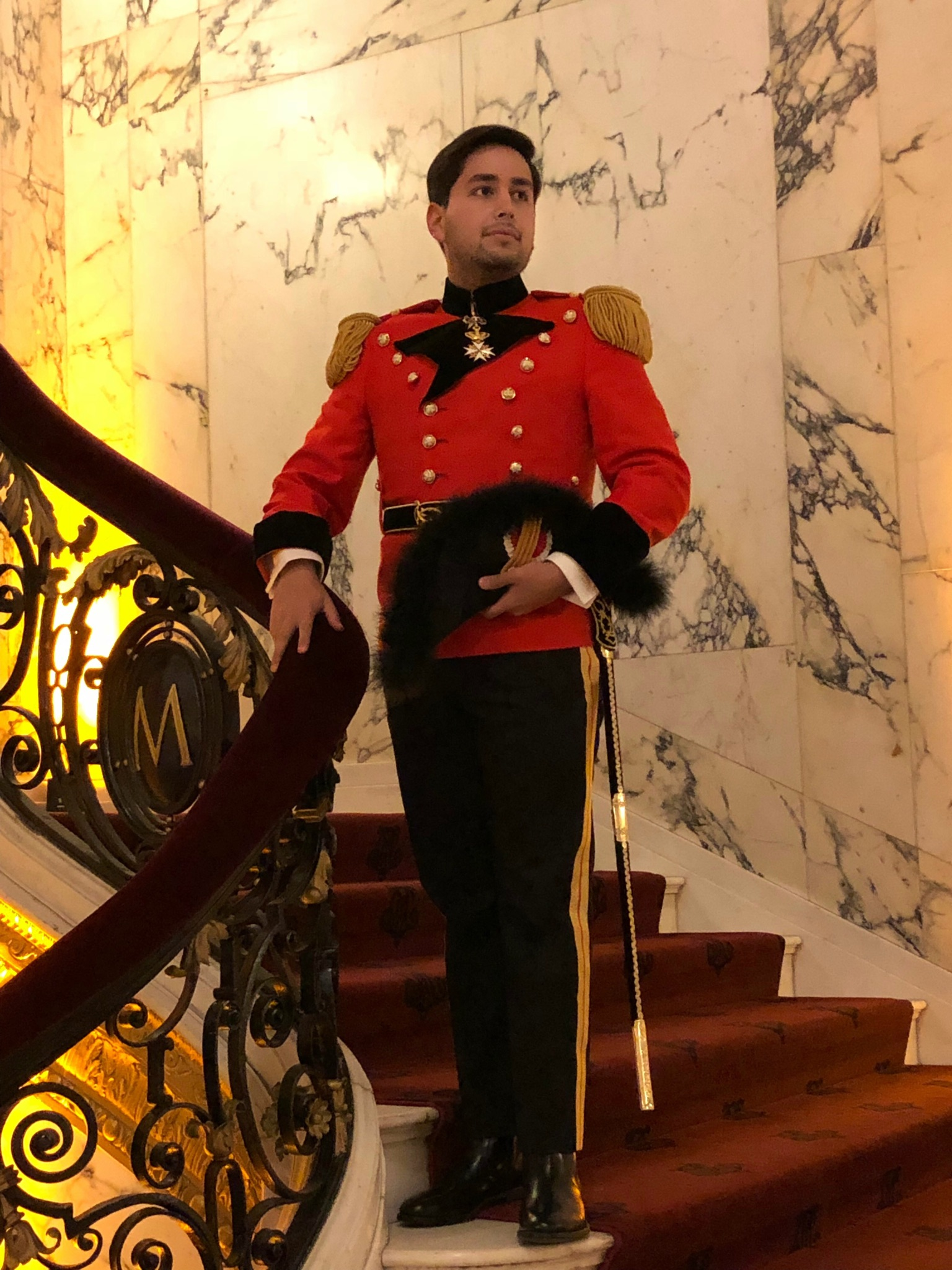 Uniforme Militar de la Soberana Orden Militar y Hospitalaria de San Juan de Jerusalén de Rodas y de Malta. Usado en ocaciones muy especiales.